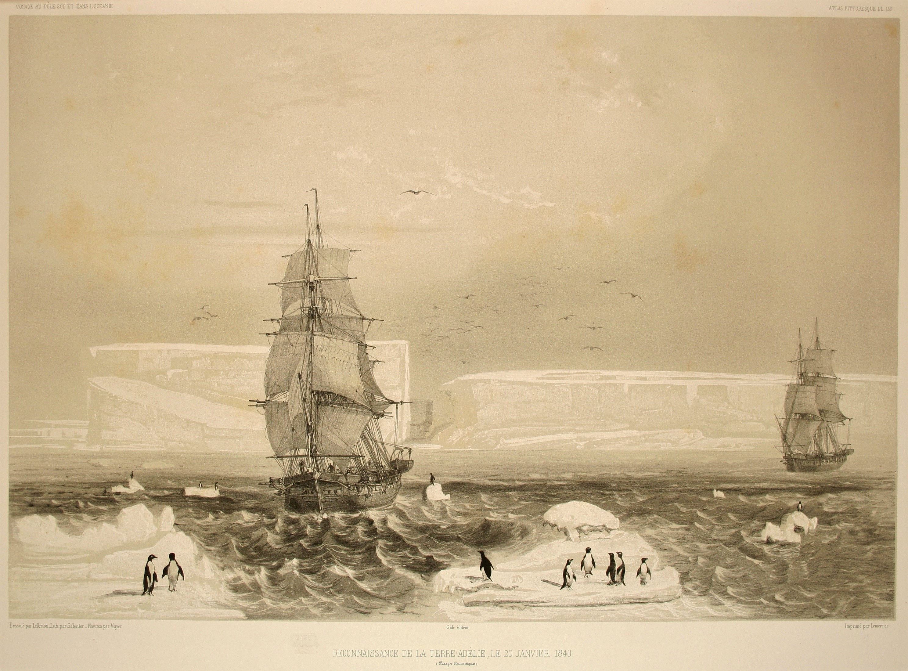 Reconnaissance de la Terre Adélie, le 20 janvier 1840. Atlas pittoresque, planche 169